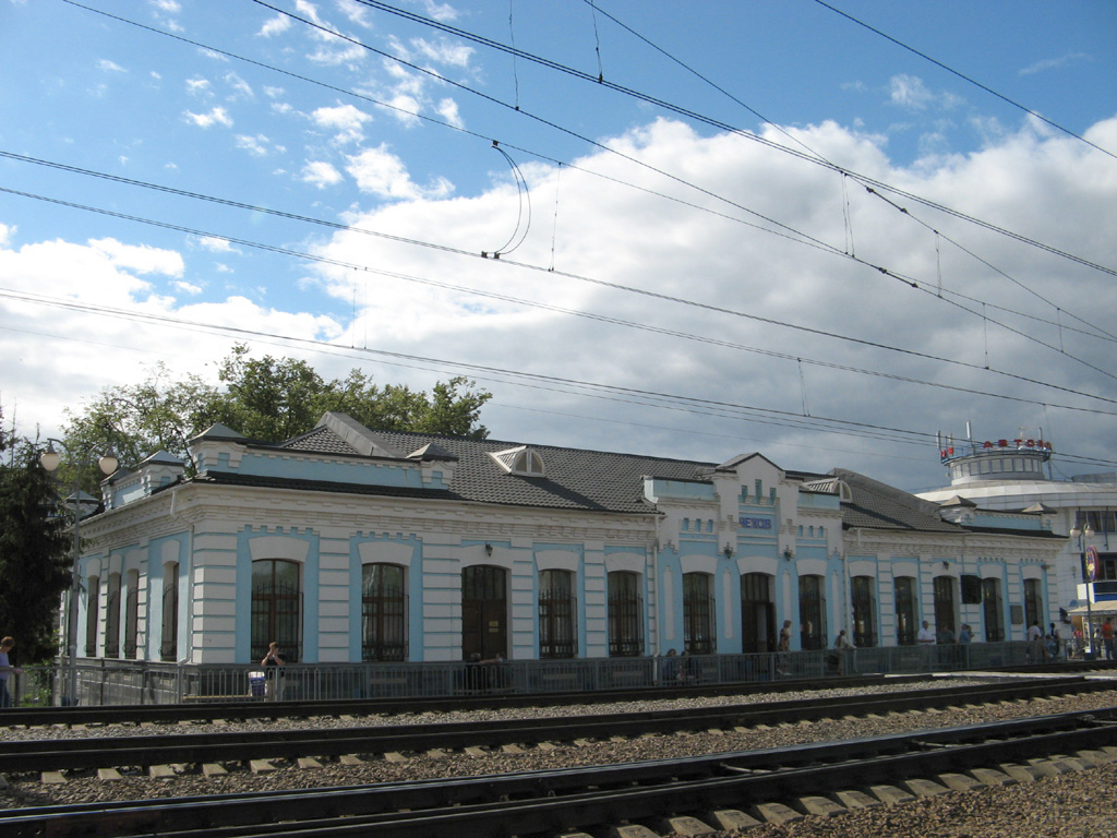 железнодорожный вокзал в г. Чехов (Московская область); railway station in Chekhov (Moscow Oblast)